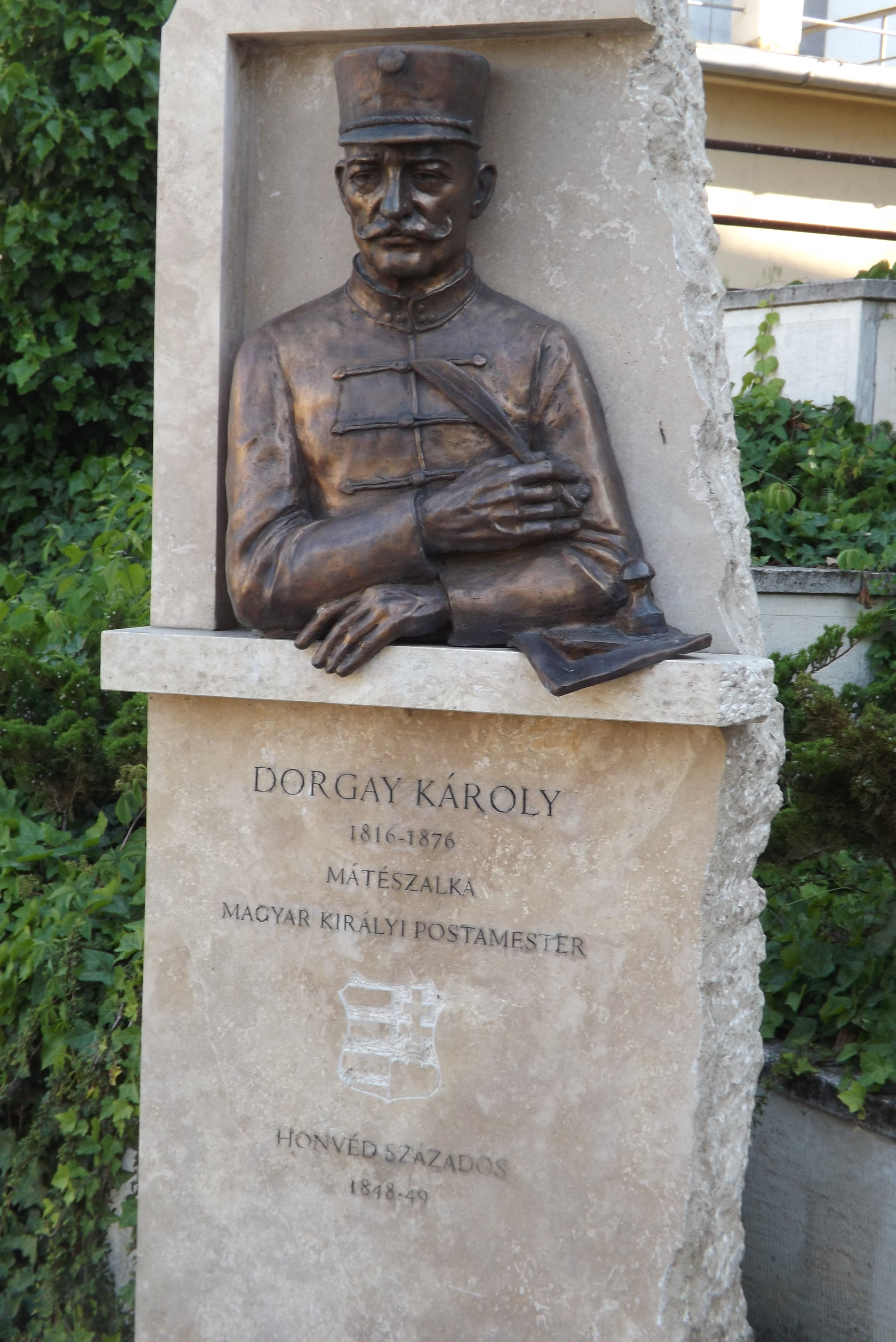 Dorgay Károly szobra, Mátészalka